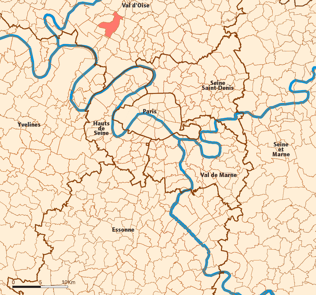 Taverny